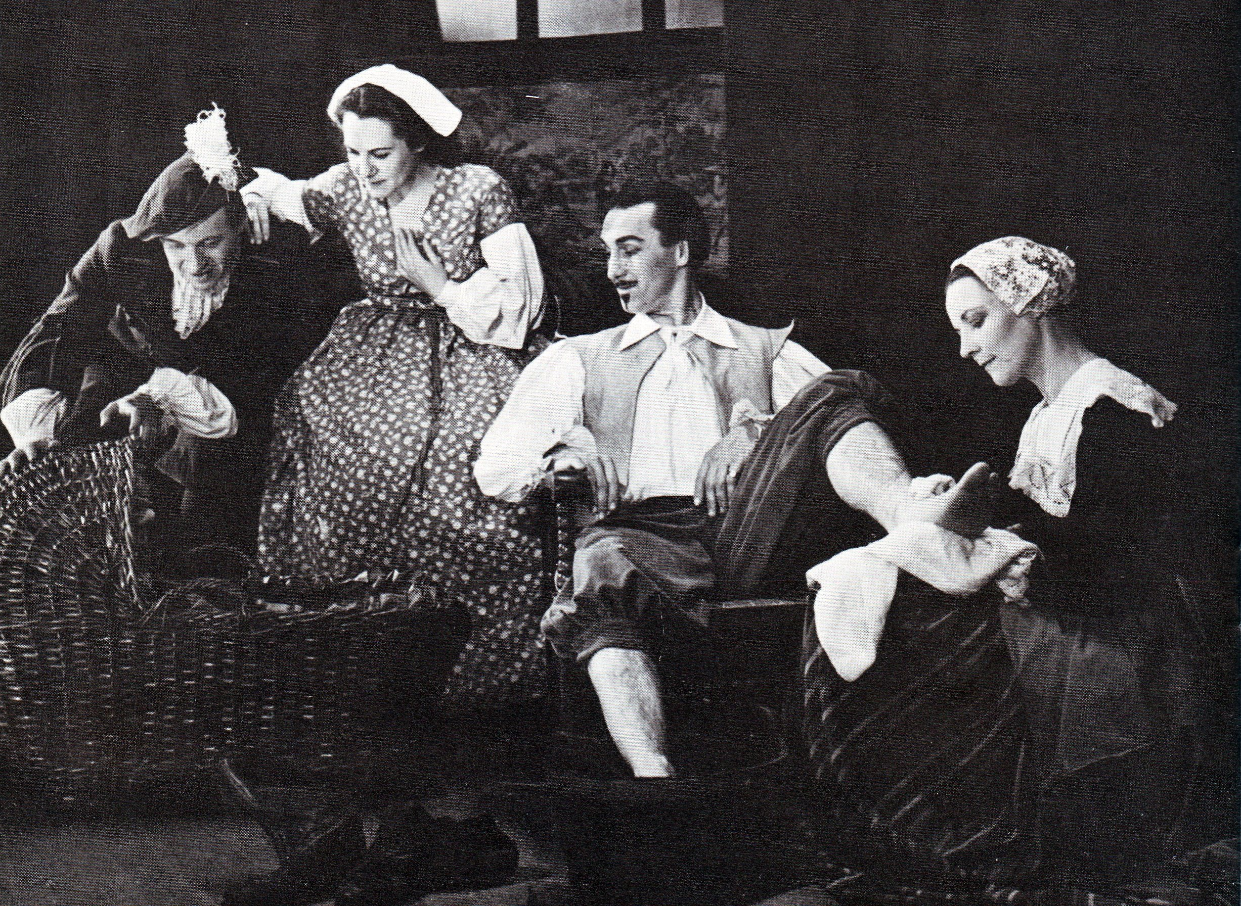 Gert van den Bergh, Paula Styger, Pierre de Wet en Anna Neethling-Pohl in 'n toneel uit Sita se Die Goeie ou tyd (1944).